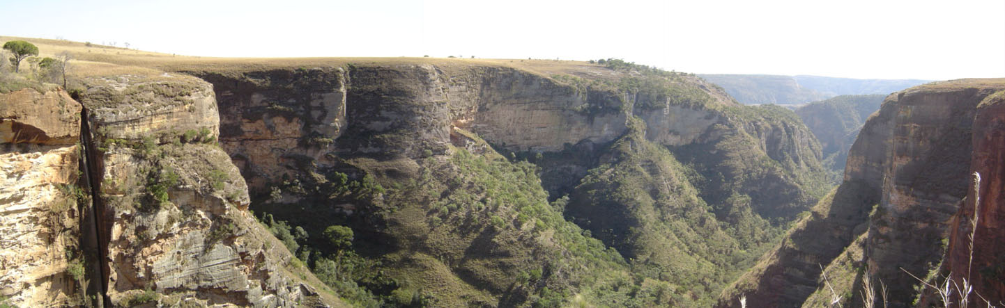 Scenery at Isalo national park of Madagascar / Landschaft im Isalo-Nationalpark in Madagaskar / Paysage au parc national Isalo à Madagascar